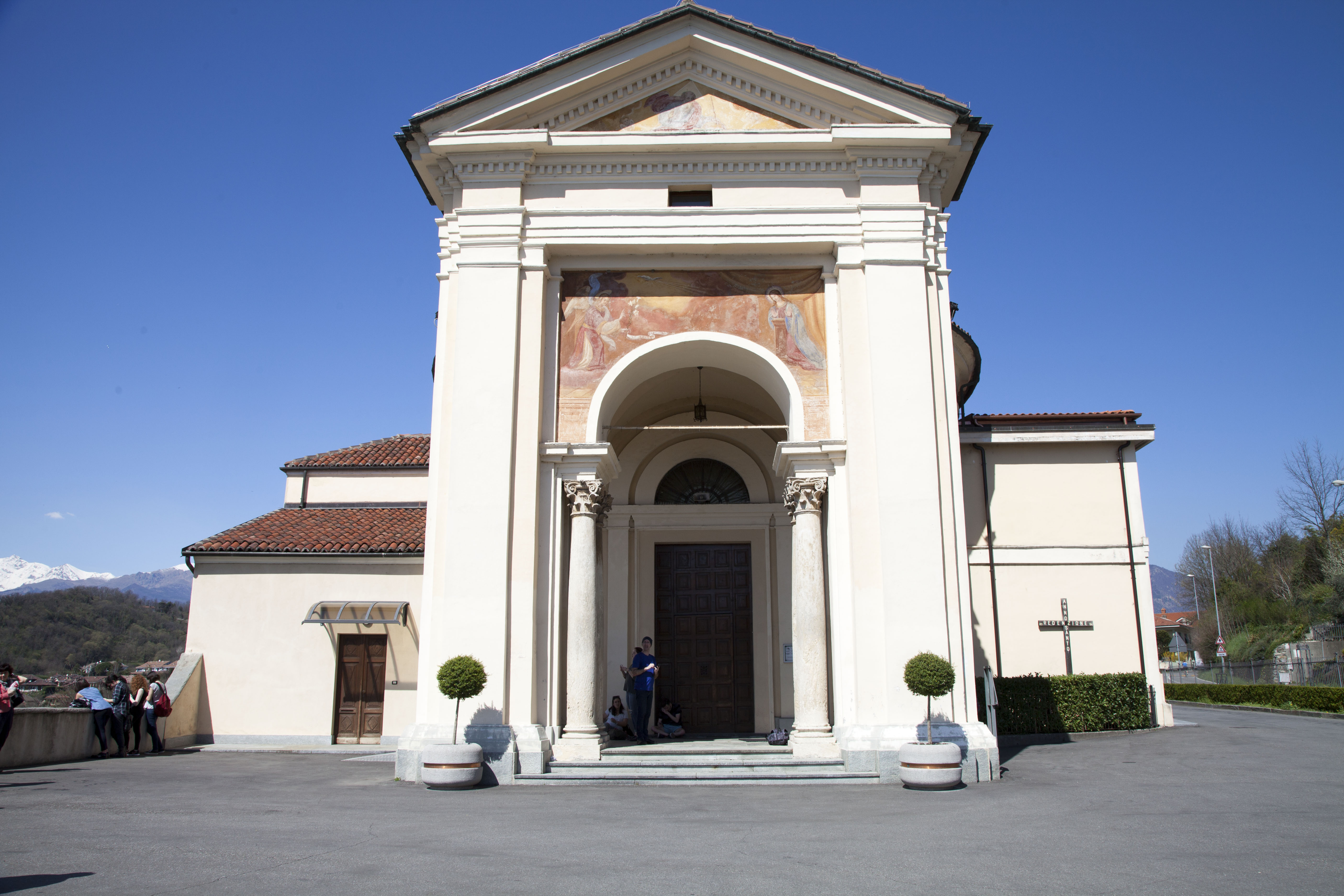 .כנסיית זו,משקיפה על האגם, והיא מנוהלת על ידי הסלזיאנים